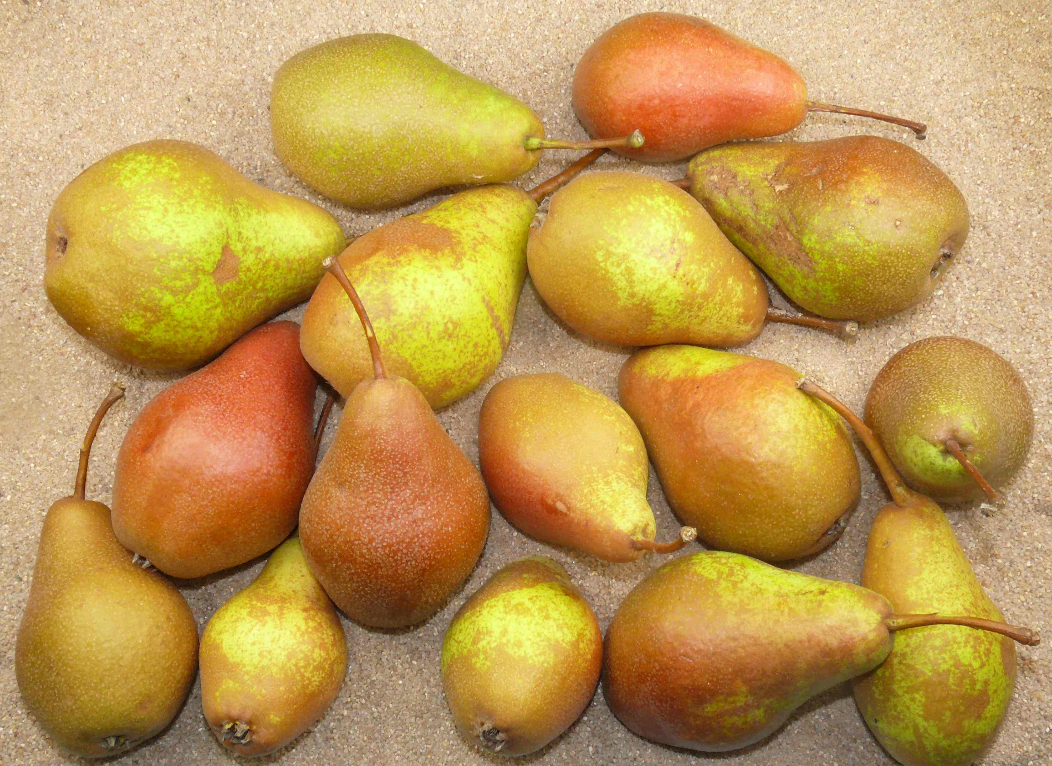 Früchte des Trockenen Martin (Winterpfalzgrafenbirne) aus Dipbach (Gde. Bergtheim, Lkr. Würzburg)